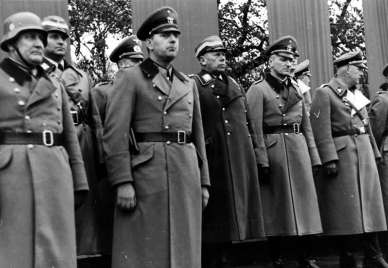 Parade im General Gouvernement in Krakau, General Daluege und ... Persönlichkeiten bei der Parade in Krakau Gen. Mj. O.P.[Ordnungspolizei!] Riege; SA Grf. Nölfe; Gen. Daluege; SA St. Hühnlein, Korpsführer der NSKK; Gen.Mj. O.P. Becker , SS-Brigf. (?)